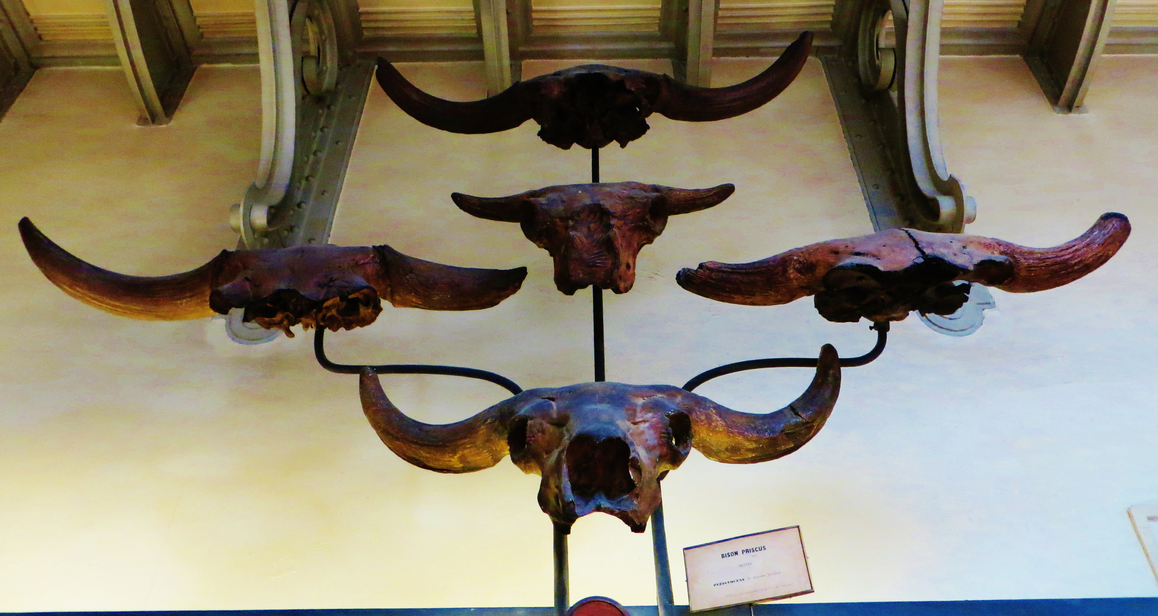 Fossil of Bison priscus, an extinct mammal- Took the photo at Museum Histoire Naturelle, Paris